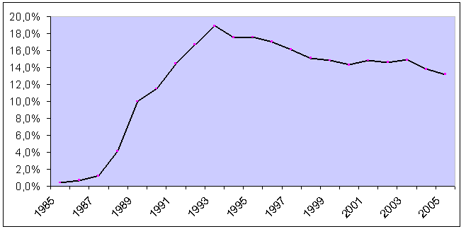 Grafische Darstellung der Marktanteile von RTL 1985-2005